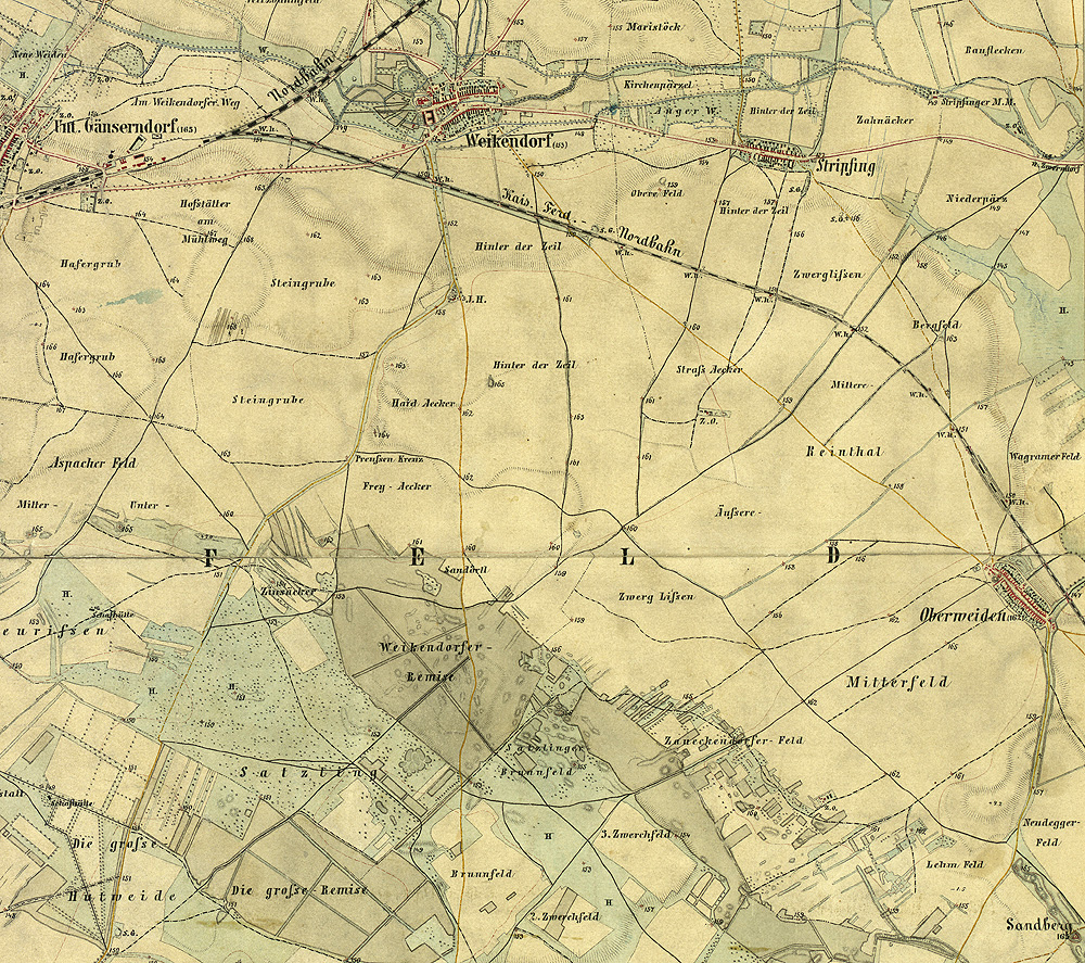 historische Landkarte: Gradkartenblatt Zone 12 Colonne XV Section d (später 4657/4). Marchfeld: Gänserndorf, Leopoldsdorf, Weikersdorf. Franzisco-josephinische (3.) Landesaufnahme der österreichisch-ungarischen Monarchie. Aufnahmeblatt 1:12.500. Aufgenommen 1873